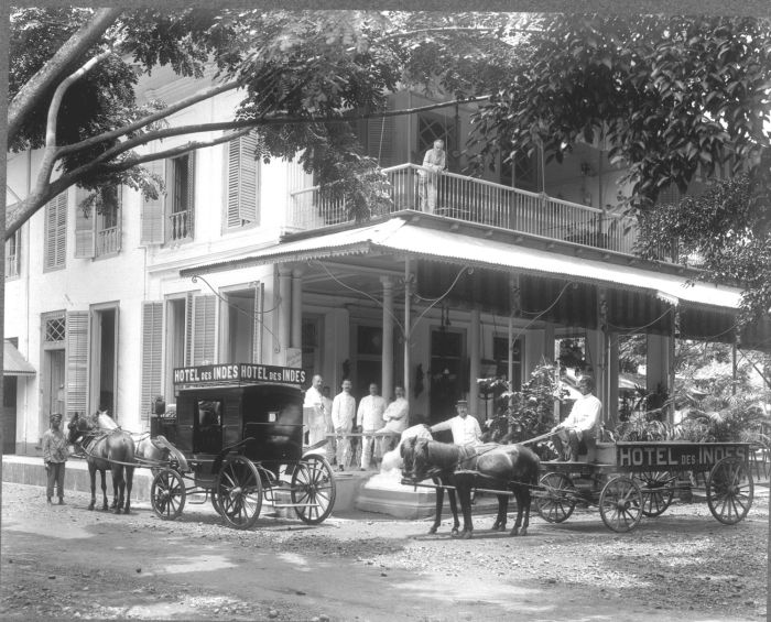 Foto. Hotel des Indes in Batavia